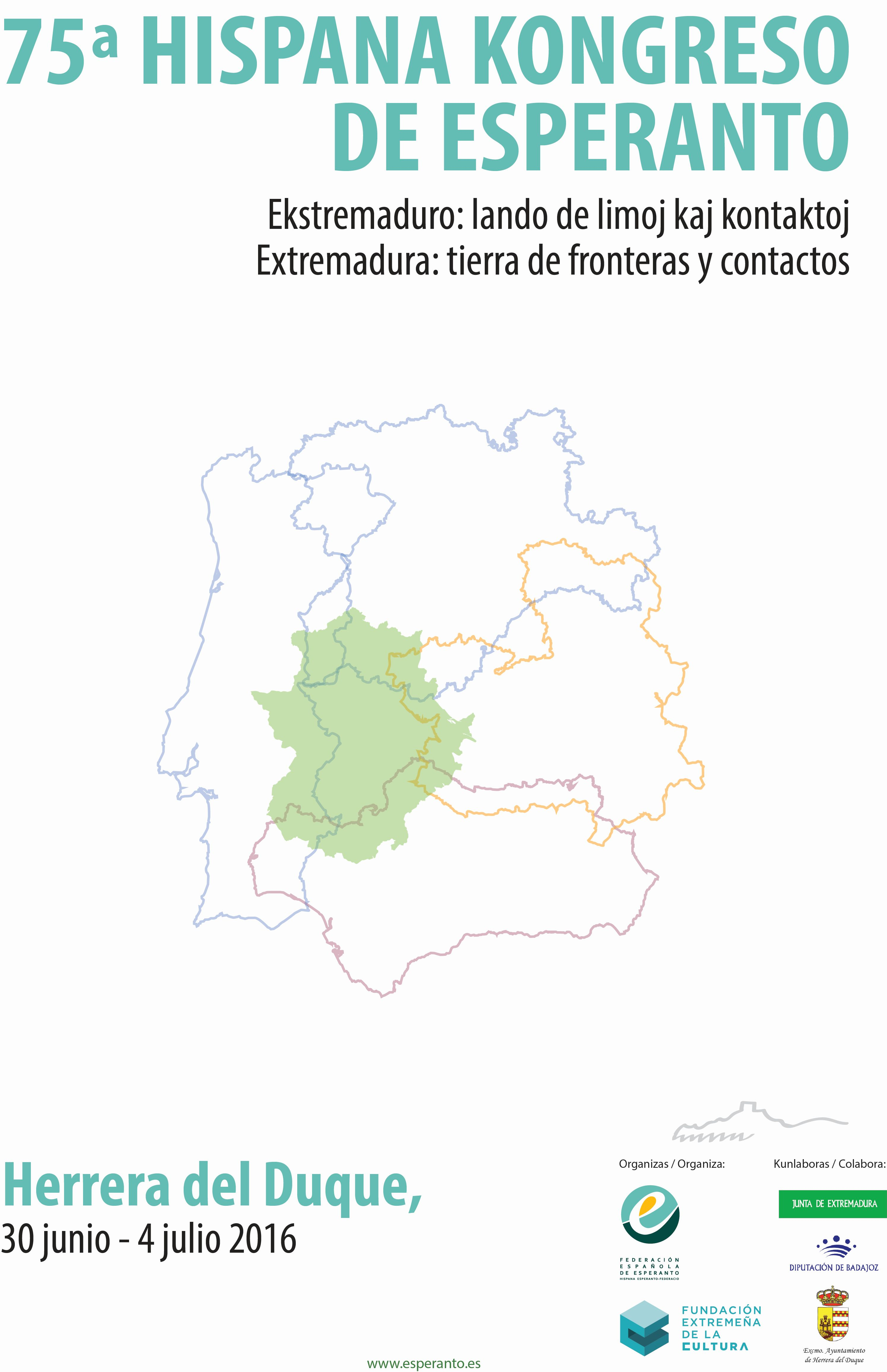 afisxo de kongreso